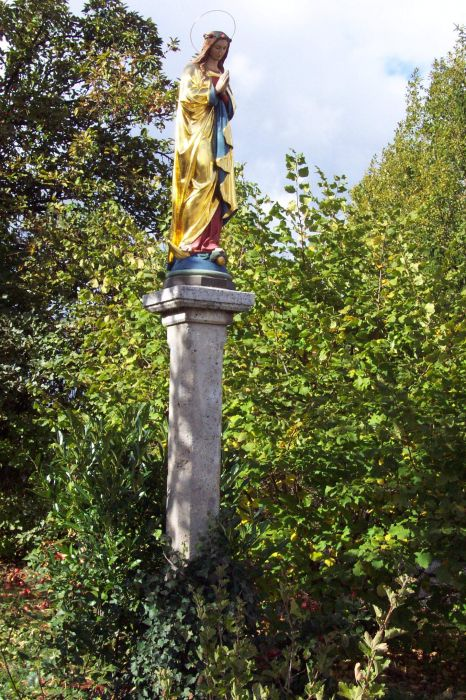 Mariensäule